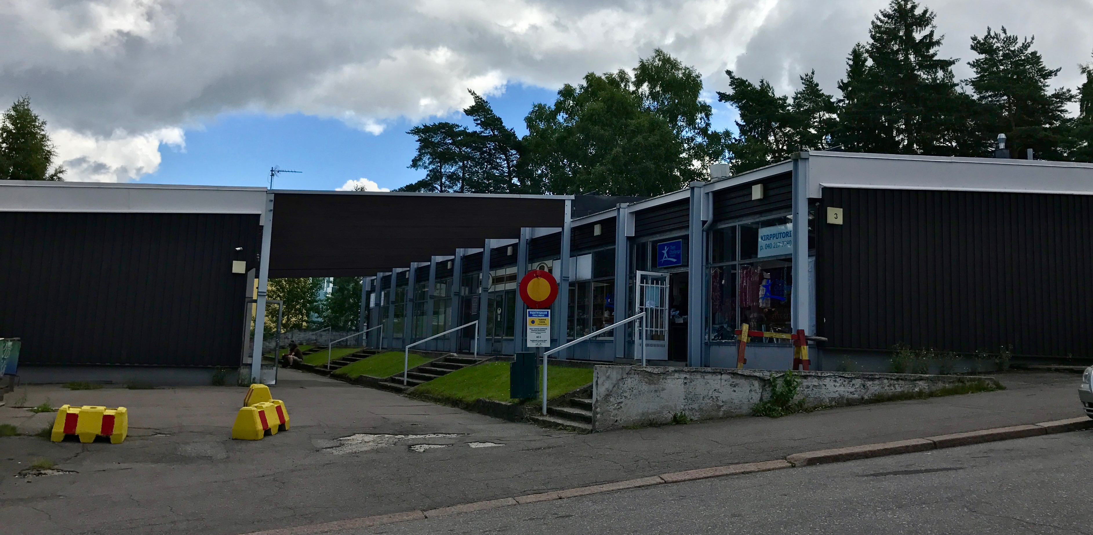 Konalanvuoren ostoskeskus Helsingin Konalassa. Ostoskeskuksen on suunnitellut Erkki Karvinen. Ostoskeskus valmistui vuonna 1961.